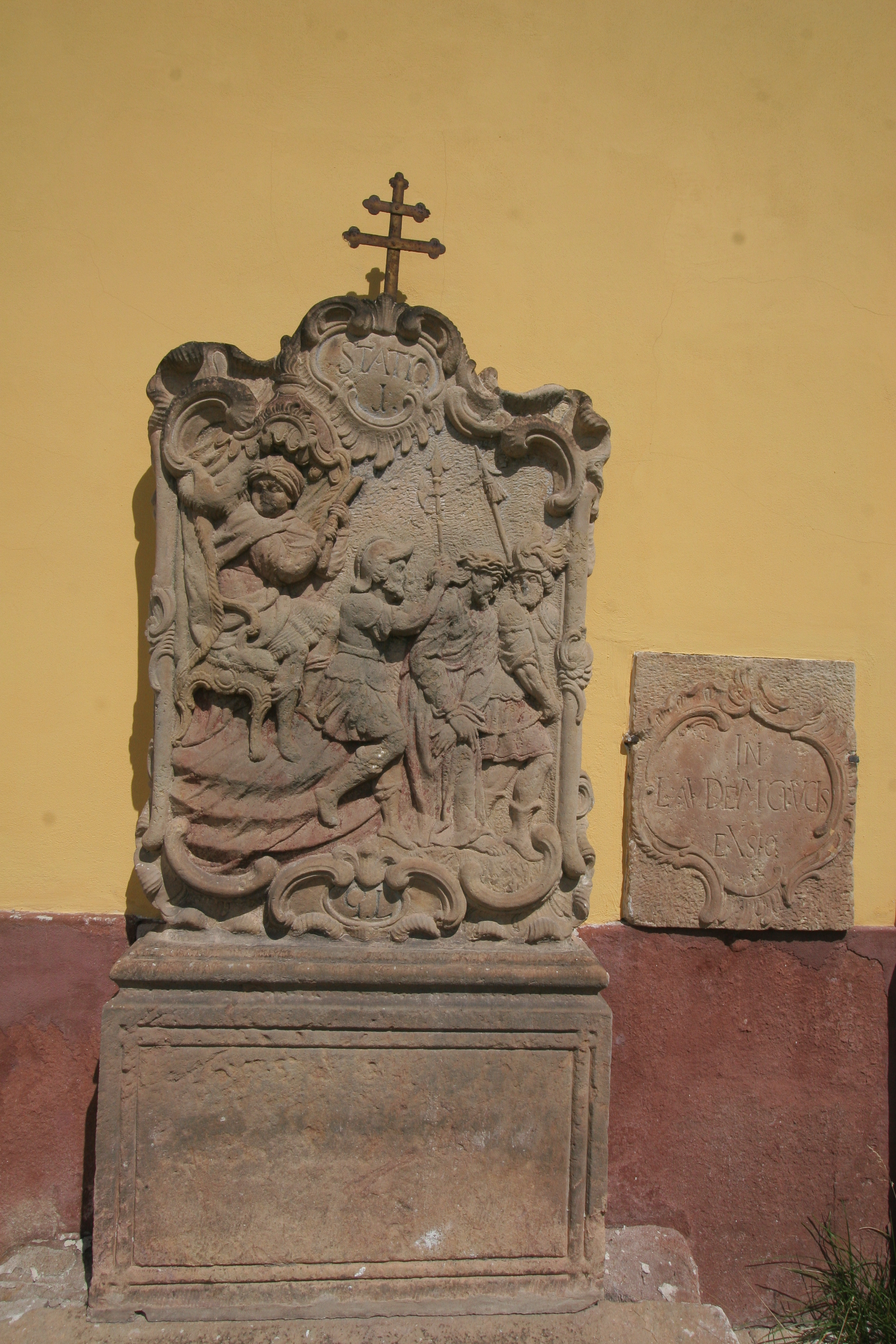 Kostel svatého Bartoloměje, Pecka, Pecka (okres Jičín). Calvary in Pecka I